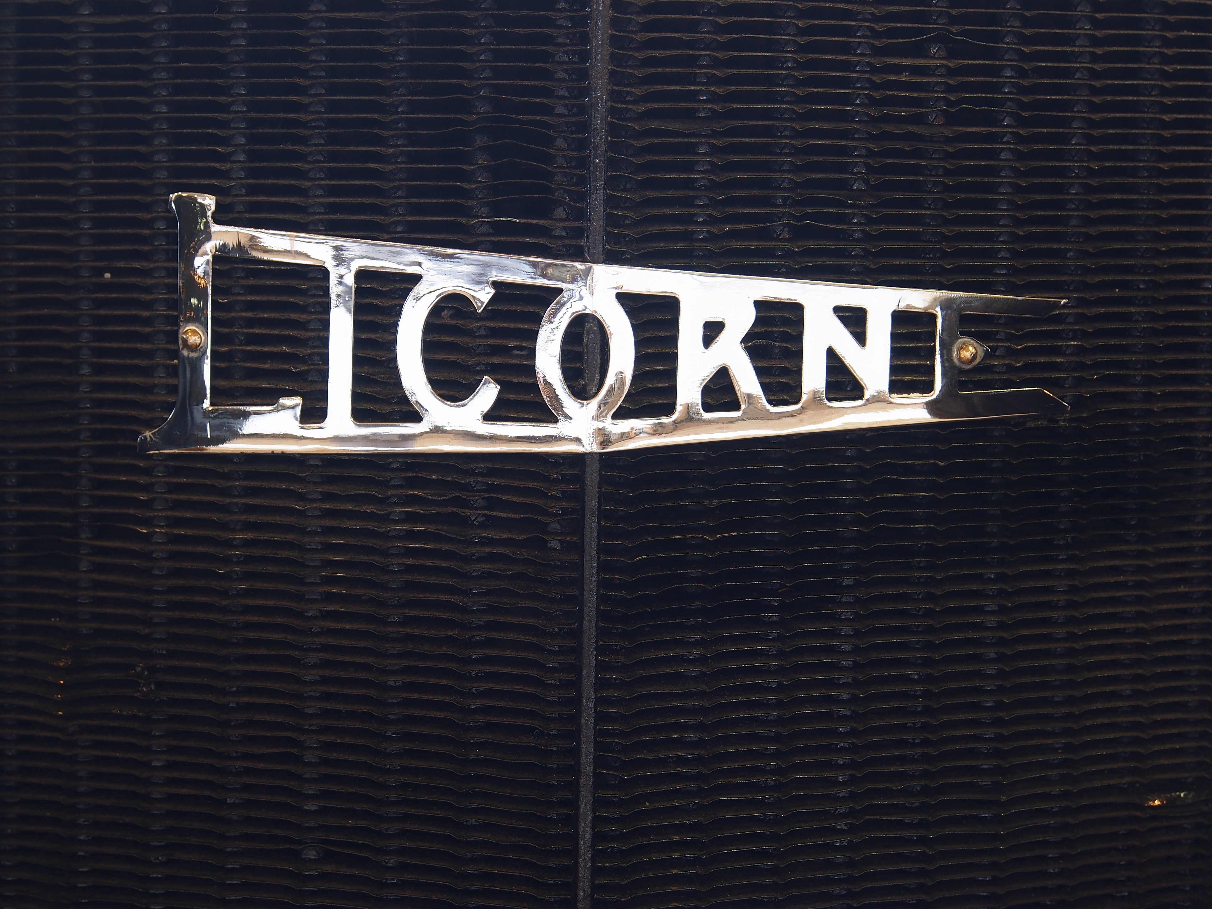 Photographed at the Musée Automobile de Vendée, France.